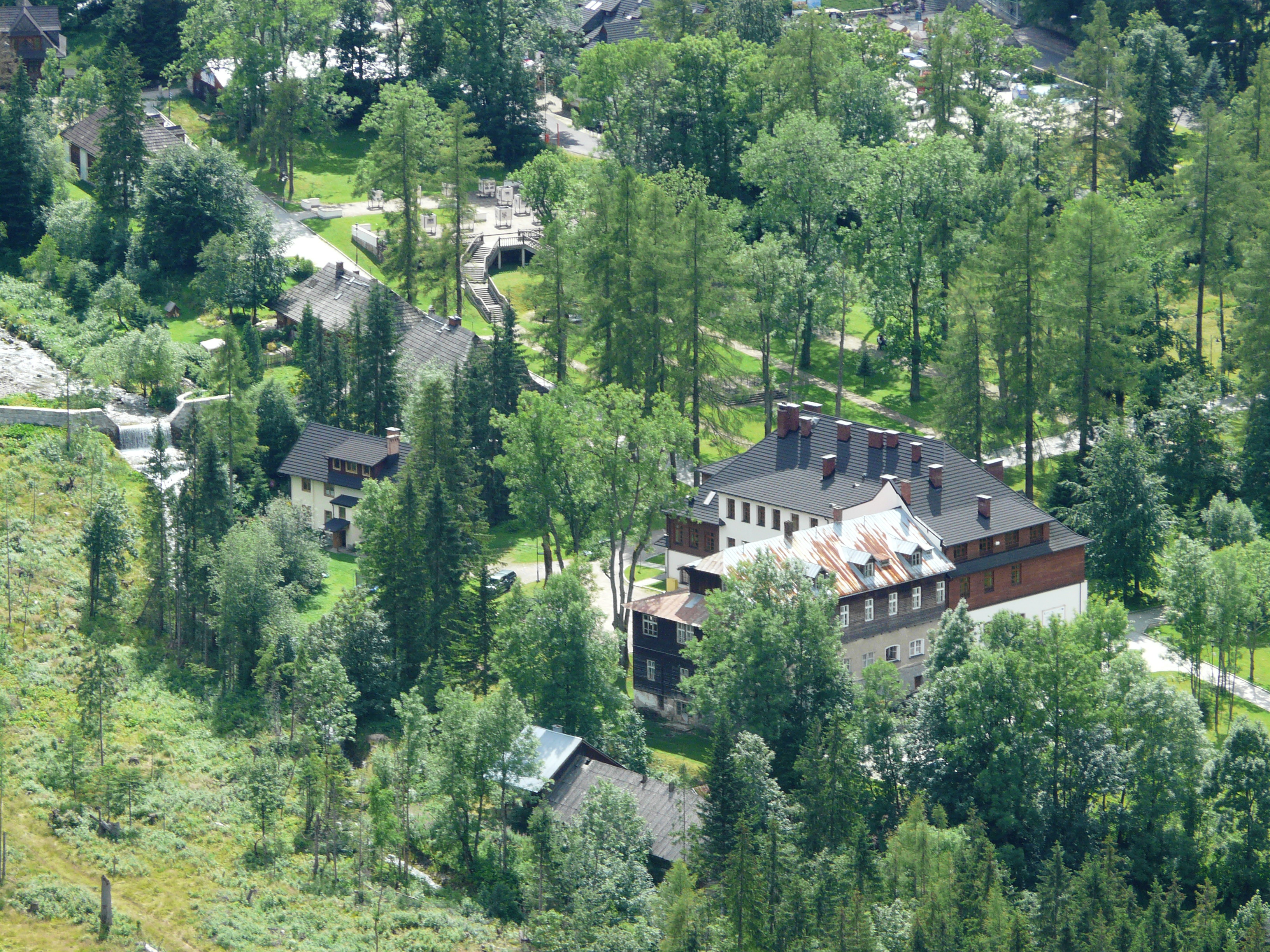 Droga na i widoki z Kużnic na Nosala, Tatry.